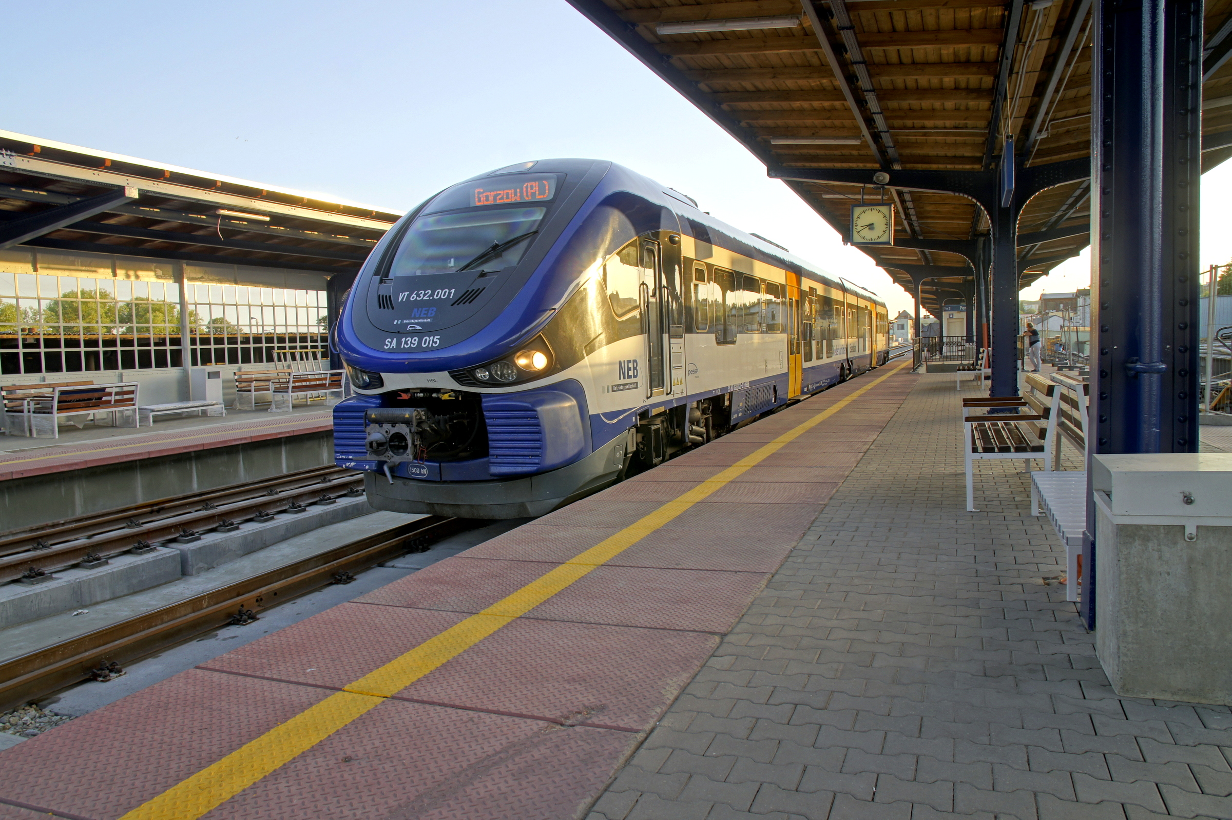 Pociąg z Berlina Lichtenberga na stacji w Gorzowie Wlkp. PESA Link SA 139-015 przewoźnika Niederbarnimer Eisenbahn (dwuczłonowy)